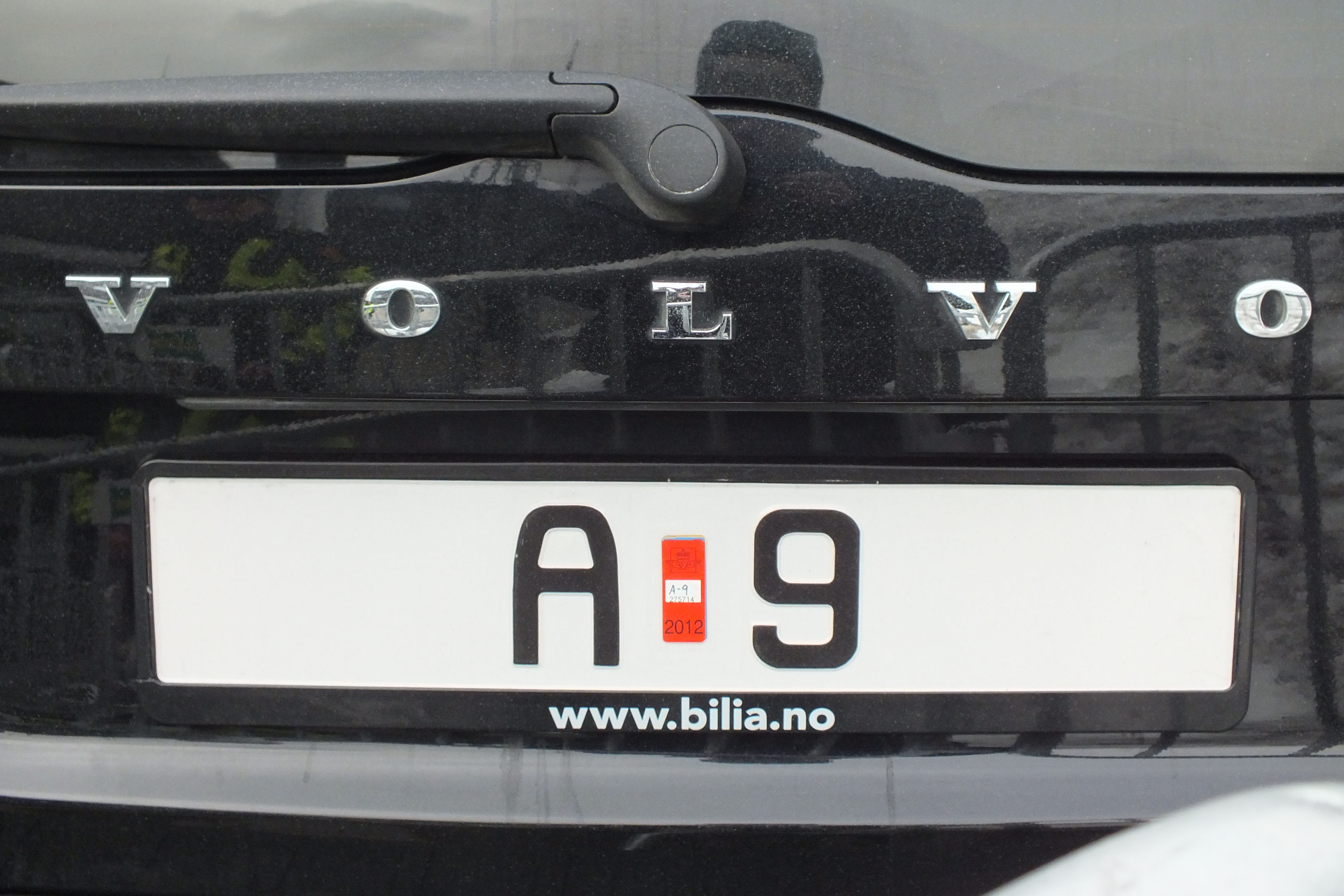 Skiltet til A9.